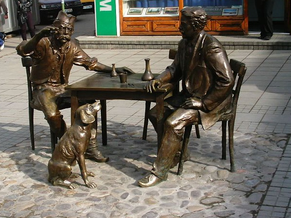 Драган Цветковиц Ниш Ниш Споменик посвећен Стевану Сремцу и чувеном ловцу из Ниша Калчи и његовом псу Чапи, ауторско дело вајара Ивана Фелкера . О Калчи и Чапи је Сремац писао у Ивковој Слави